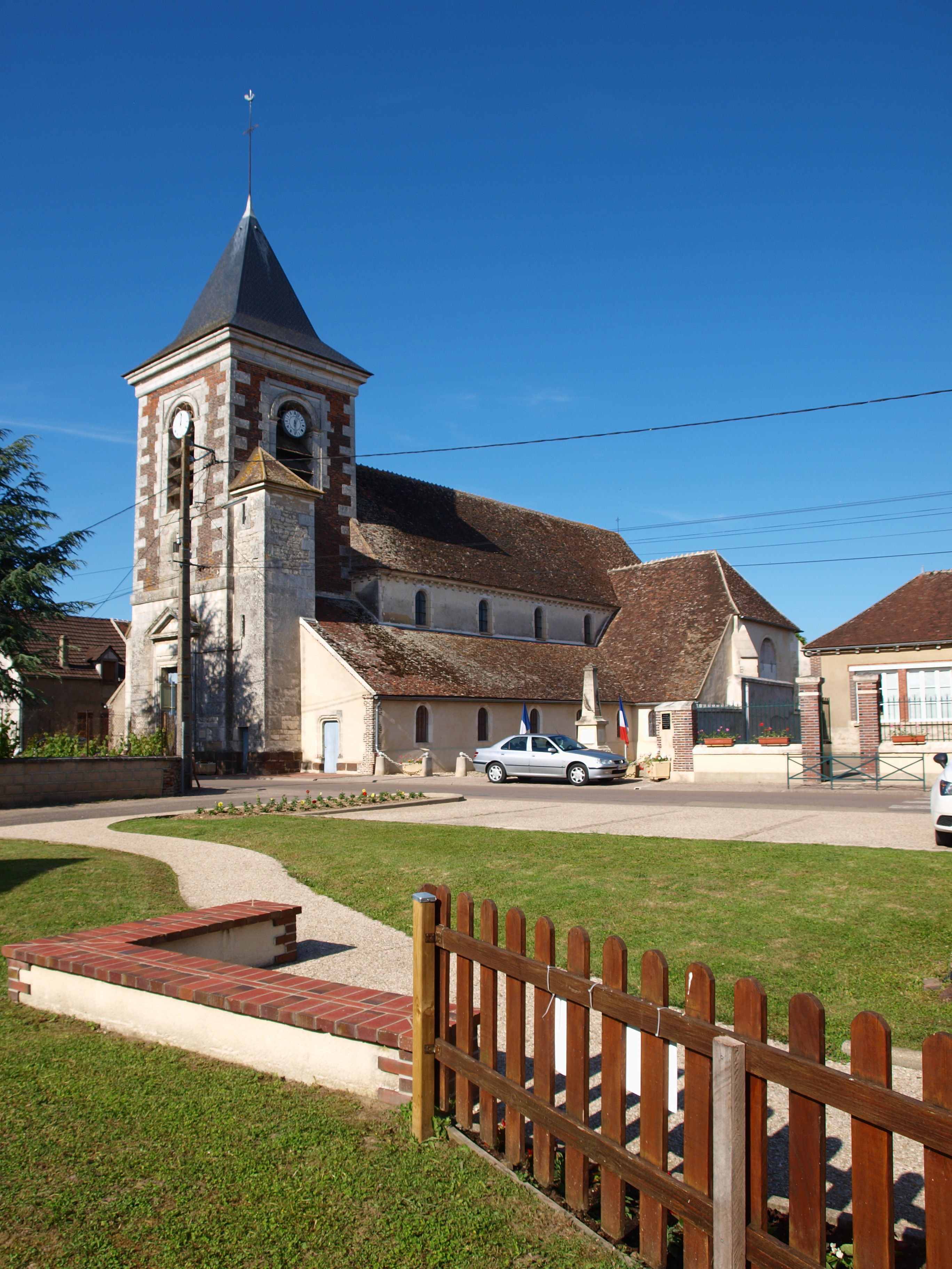 Chassy (Yonne, France)